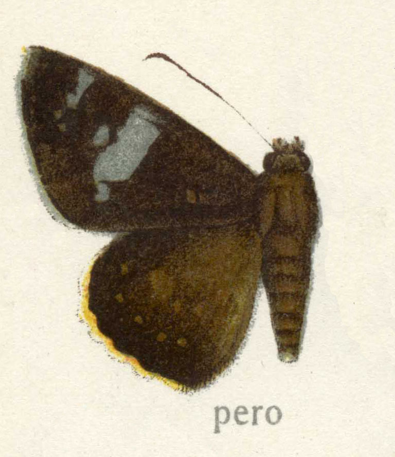 Celaenorrhinus pero